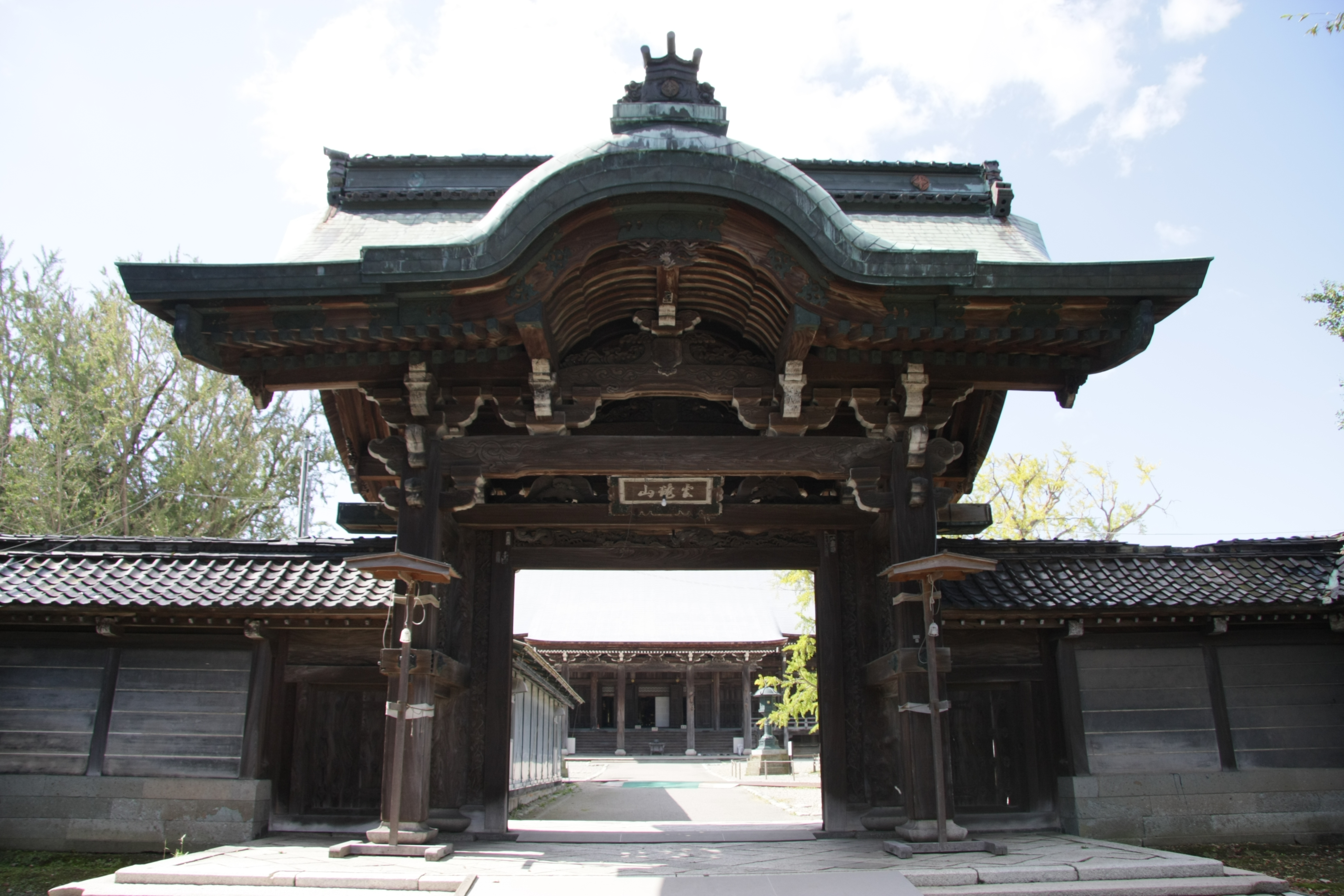 勝興寺の唐門